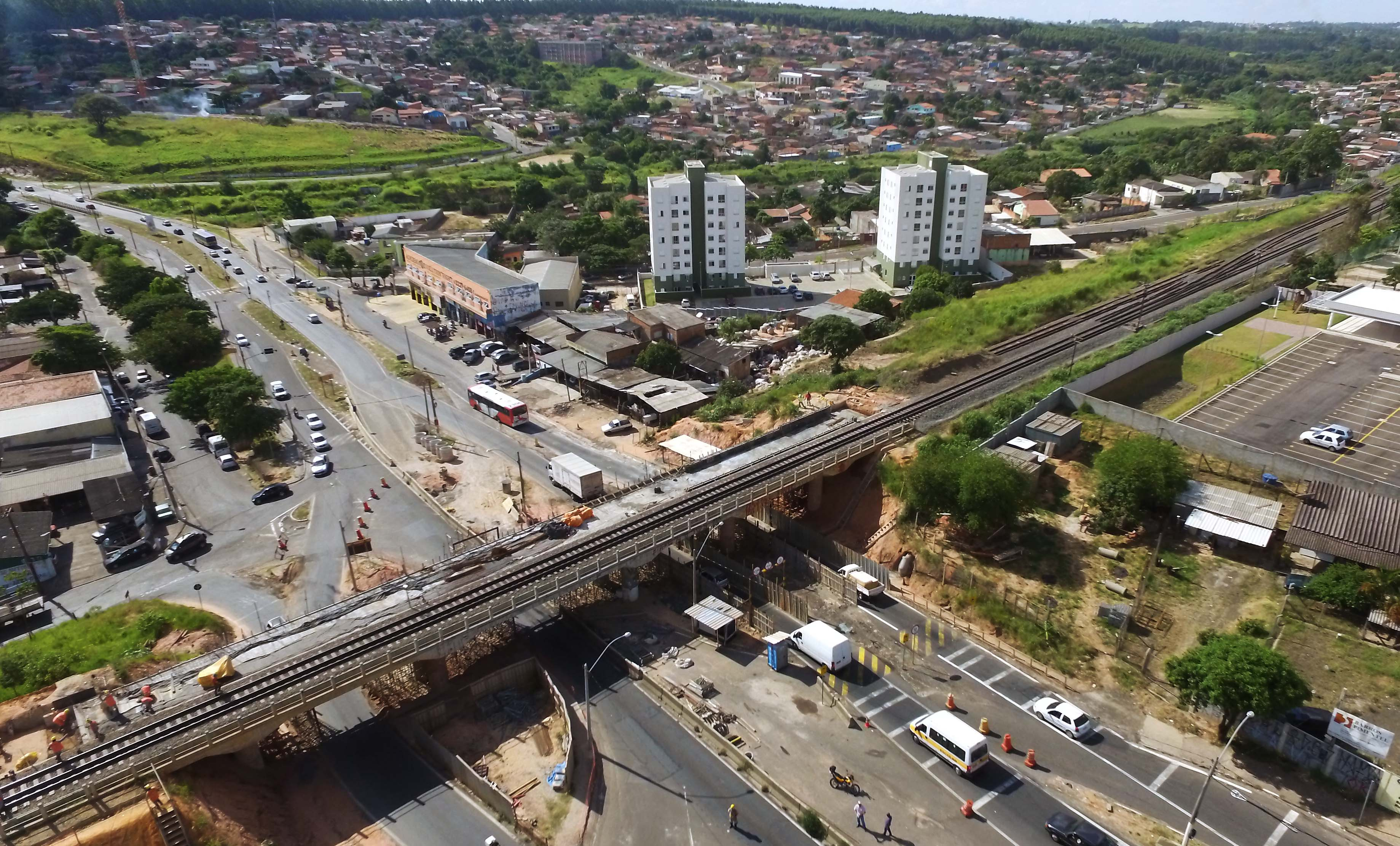 Foto Carlos Bassan